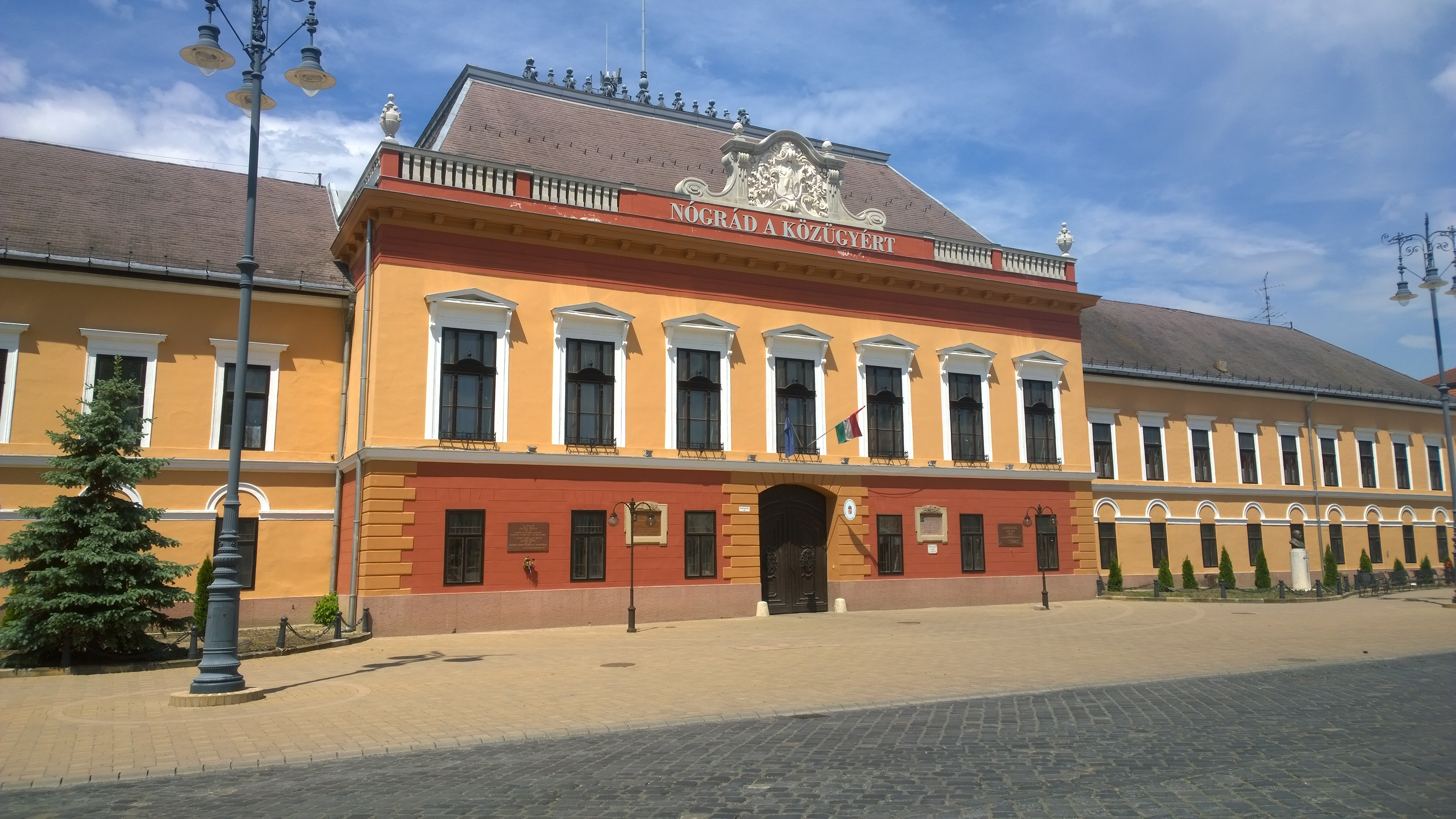 A balassagyarmati vármegyeháza új burkolattal (napsütésben) This is a photo of a monument in Hungary. Identifier: 6510